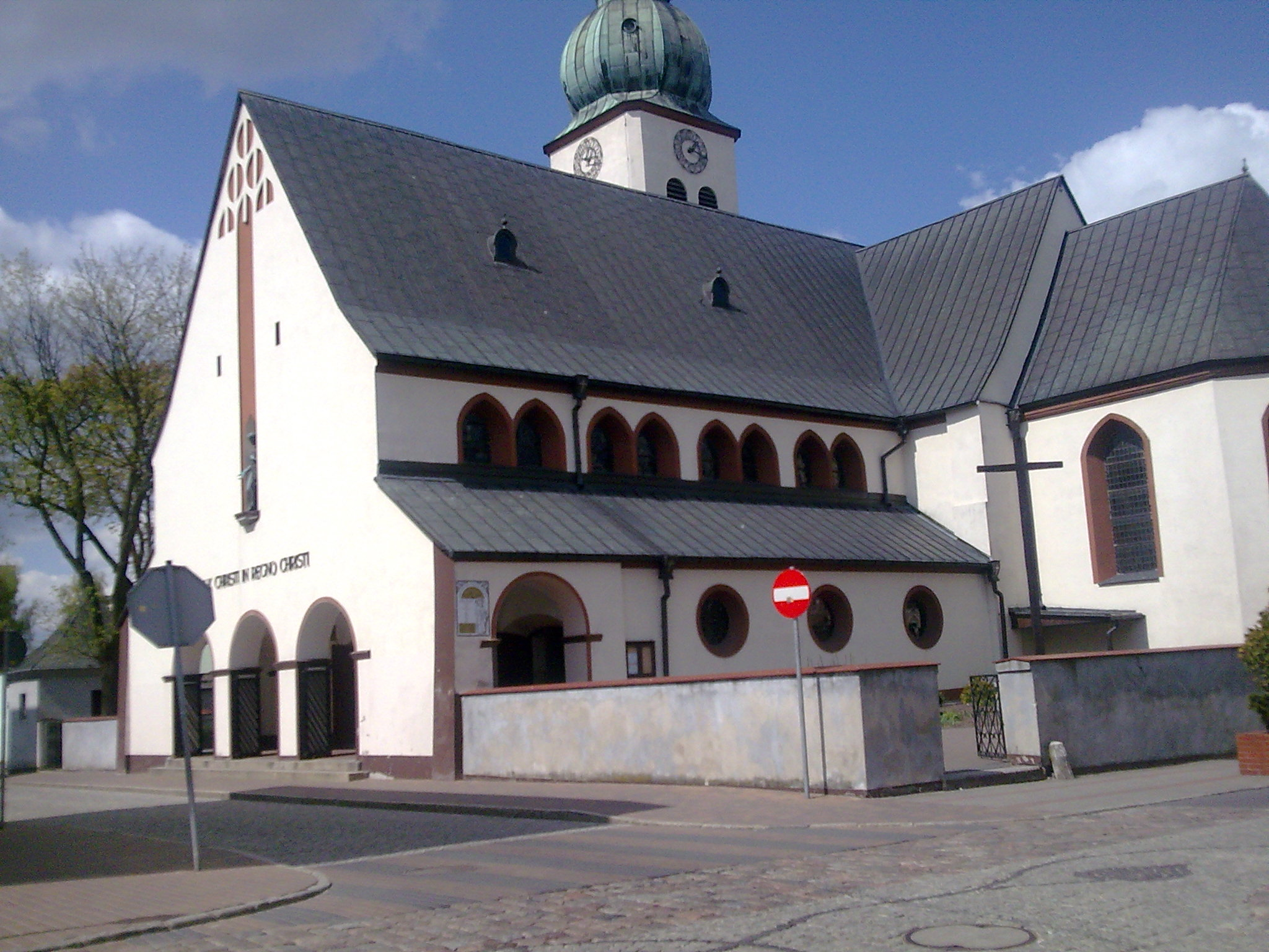 Kościół Św. Jakuba Starszego Apostoła w pobliżu człuchowskiego rynku